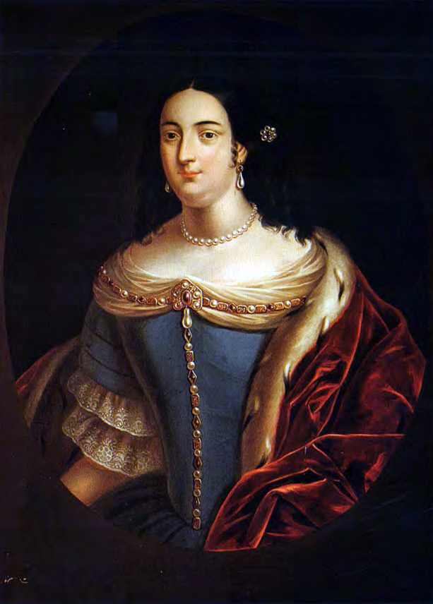 Беларуская (тарашкевіца): Партрэт Кацярыны Радзівіл (Kaciaryna Radzivił) з роду Сабескіх